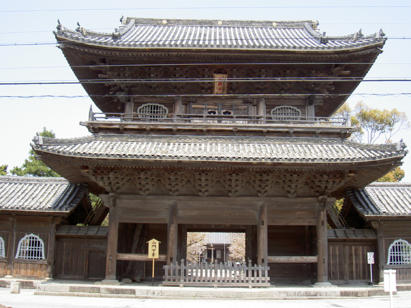 大樹寺の山門- Daijuujisanmon, Okazaki, Aichi